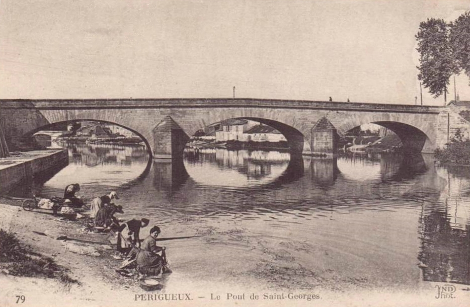 Vue générale du pont Saint-Georges qui traverse l'Isle, avec des lavandières au bord de l'eau, à Périgueux (Dordogne, France).